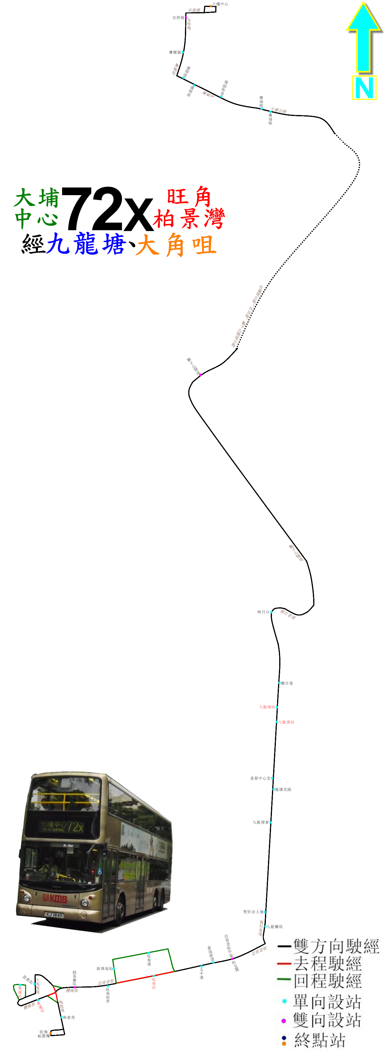 中文（香港）: 九巴72X線的走線圖